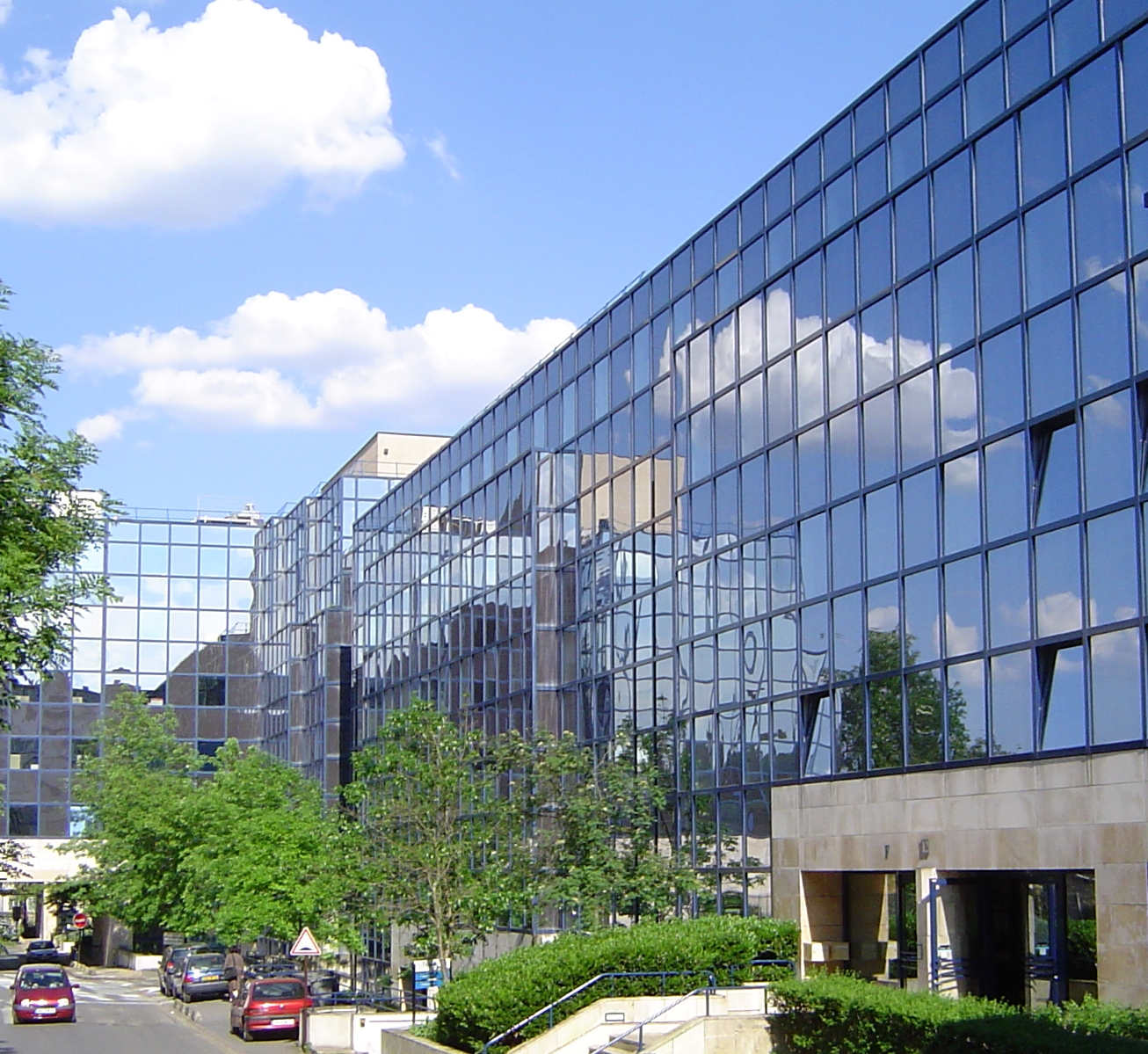 Antony